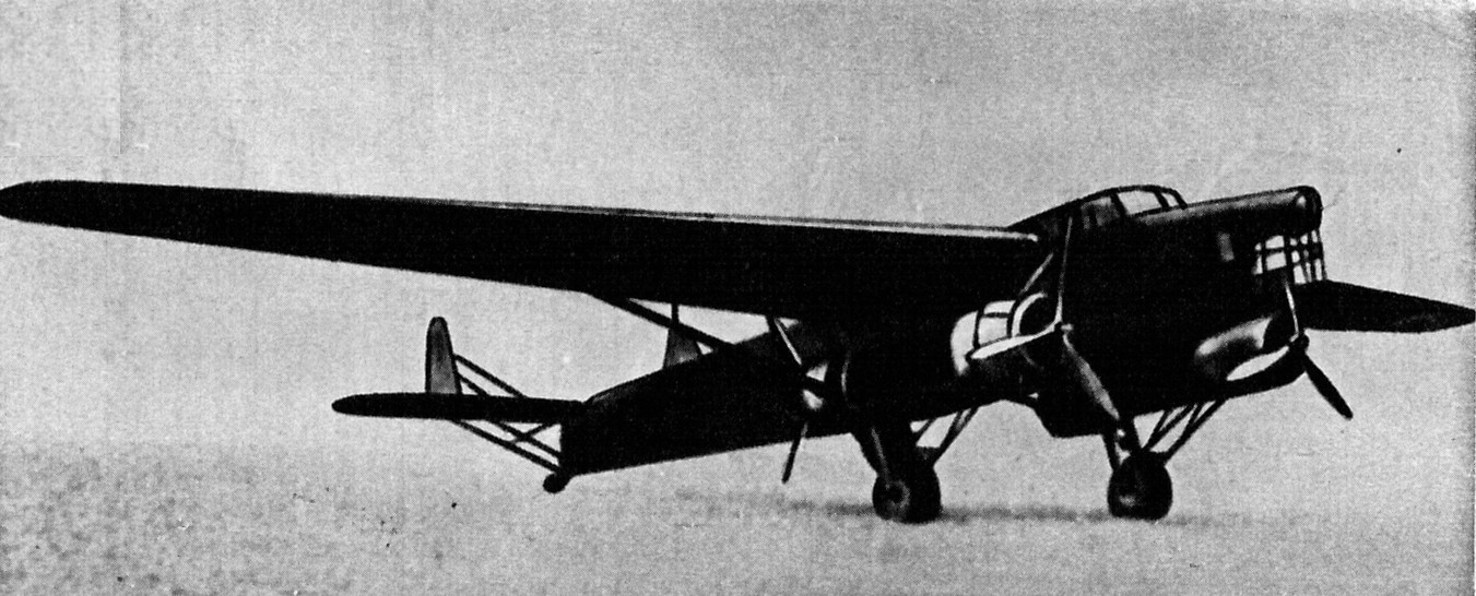 Francuski samolot bombowy Farman F.223.